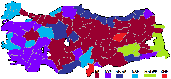 1995 genel seçimleri sonuçlarının Türkiye haritasında gösterimi.